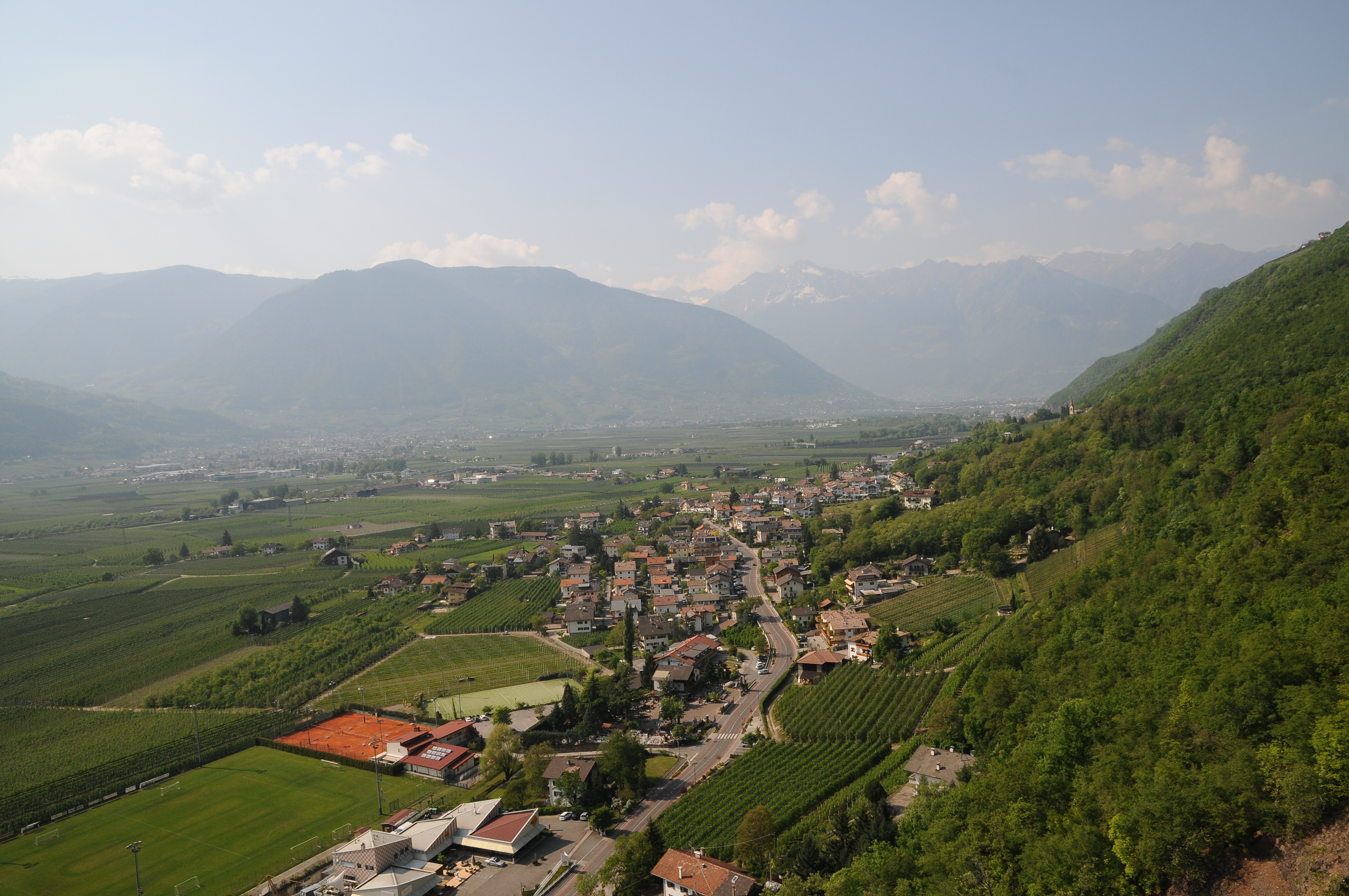 Blick auf in Burgstall und Lana.